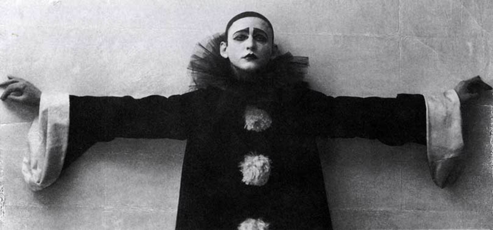 Главным сценическим образом Вертинского долгое время был грустный клоун — «русский Пьеро» с печальными глазами. И этот образ был тепло встречен во всех странах, где он жил и выступал – в Европе, Азии, Америке. Повсюду Вертинский завоевывал успех, особенно среди русскоязычной публики.